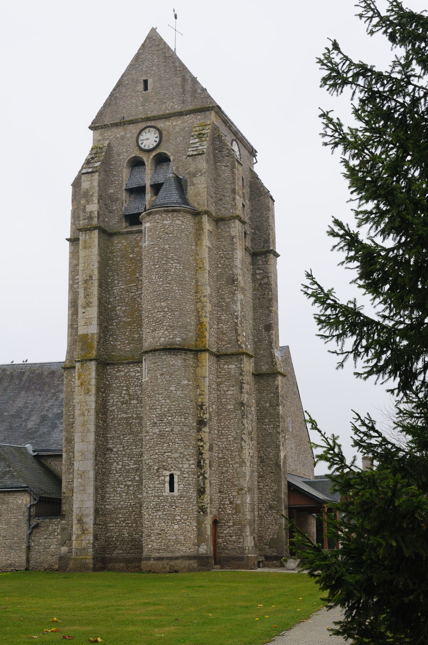 Église Saint-Symphorien de Vennecy, Loiret, France